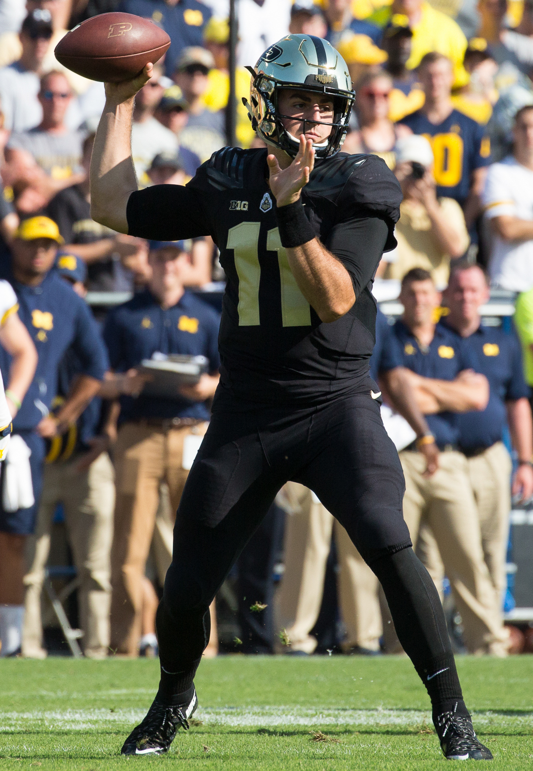 PAB_MichiganAtPurdue2017_55